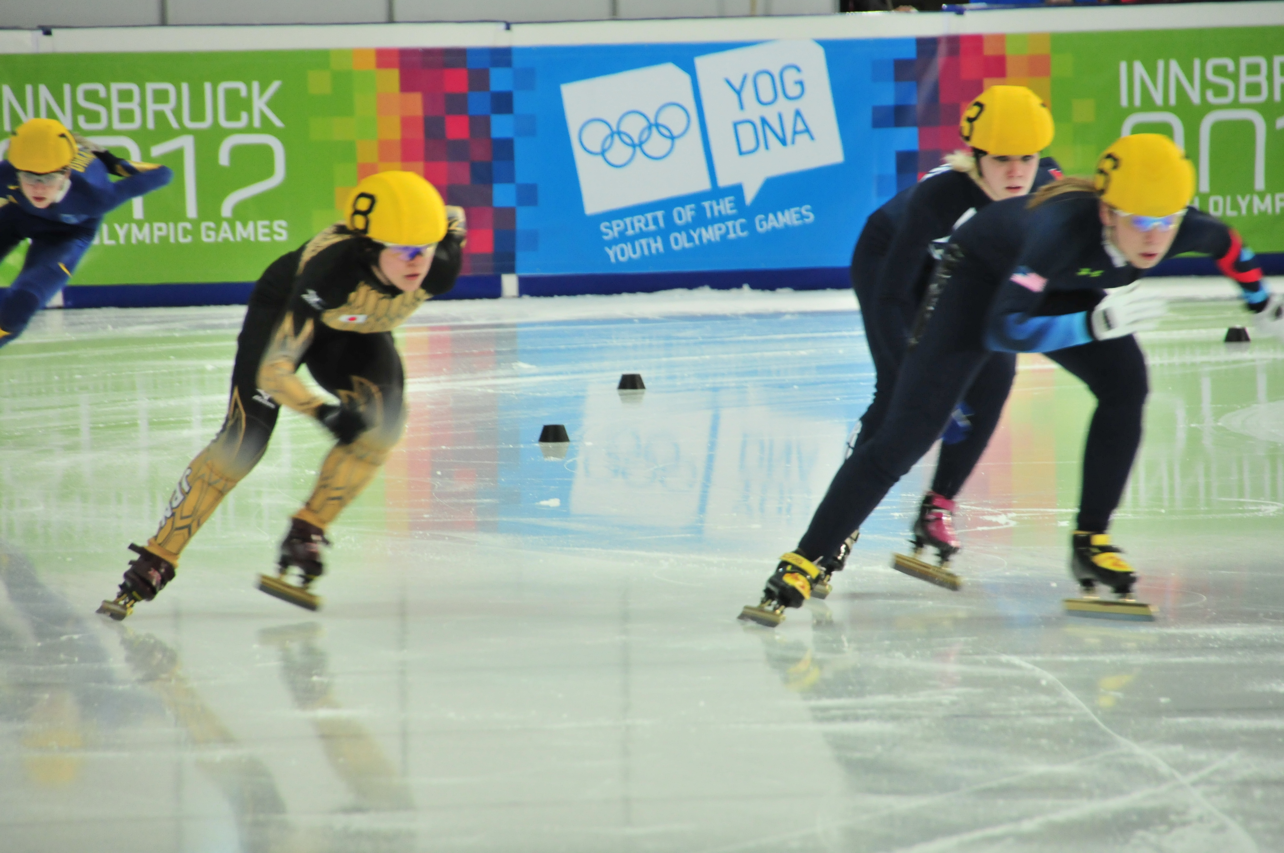 1. Jugendolympiade 2012 Innsbruck. Sarah Warren (USA), Anna Gamorina (RUS) und Sumire Kikuchi (JP) von rechts nach links. Teilnehmerinnen am Short Track Speed Skating Wettbewerb. Erste Olympische Jugend- Winterspiele 201213. bis 22. Jänner in Innsbruck Dieses Foto wurde durch die Unterstützung von Wikimedia Österreich und die Twoonix Software GmbH ermöglicht.